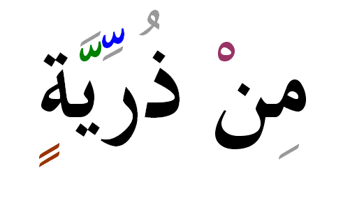 Սուքուն, շադդա, թանուին քասրա